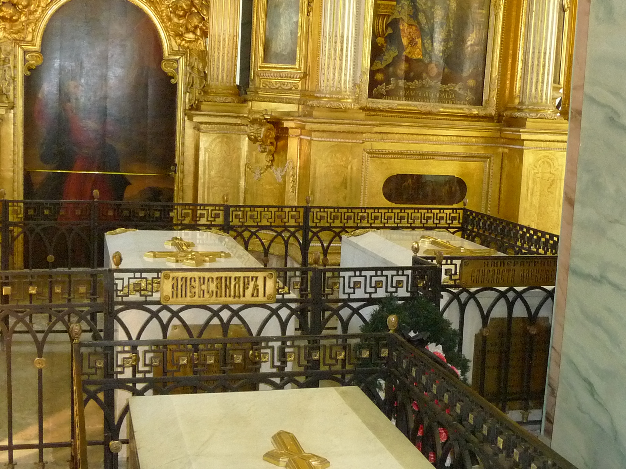 RussianTzarsTumbs-p1030591.jpg